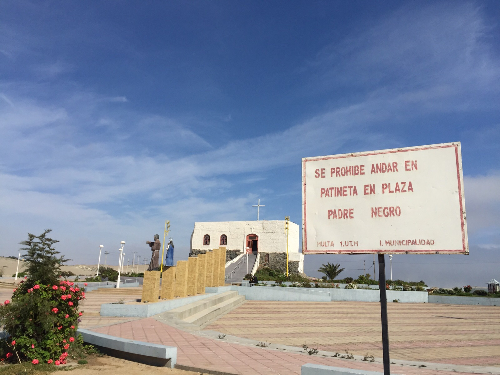 Plaza Padre Negro en Chile.